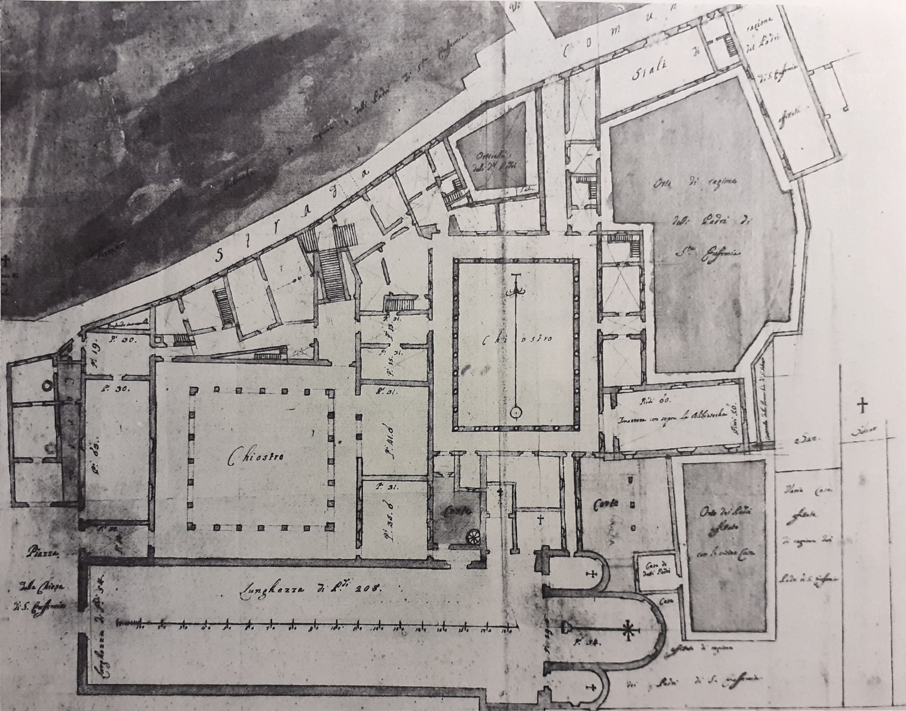 Planimetria della chiesa di Sant'Eufemia a Verona